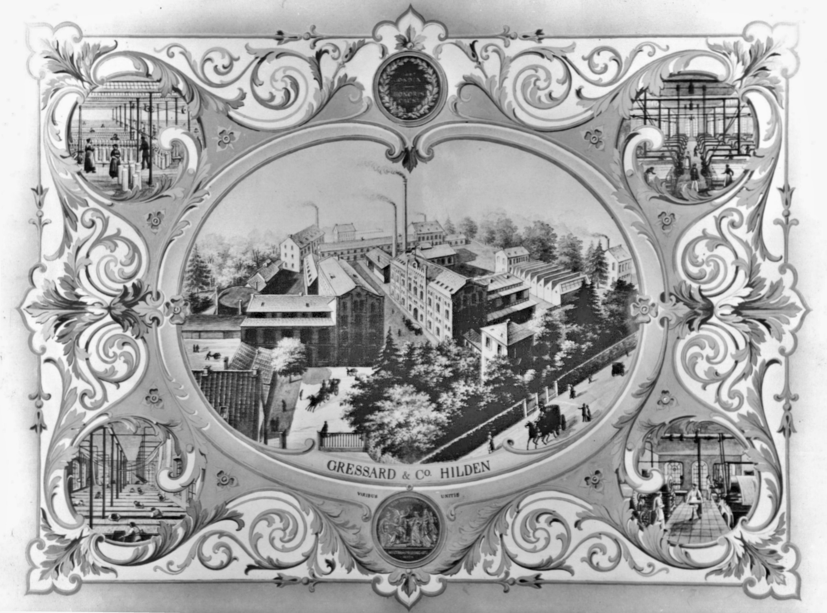 Stich der Firma Gressard & Co. Hilden